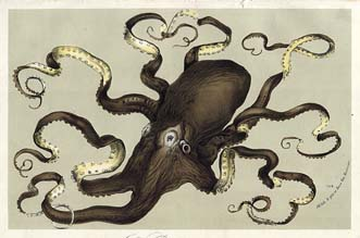 La Pieuvre (The Octopus)